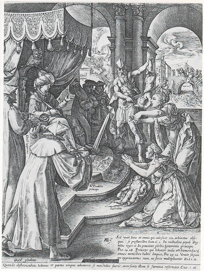 Salomo’s Judgement. engraving.